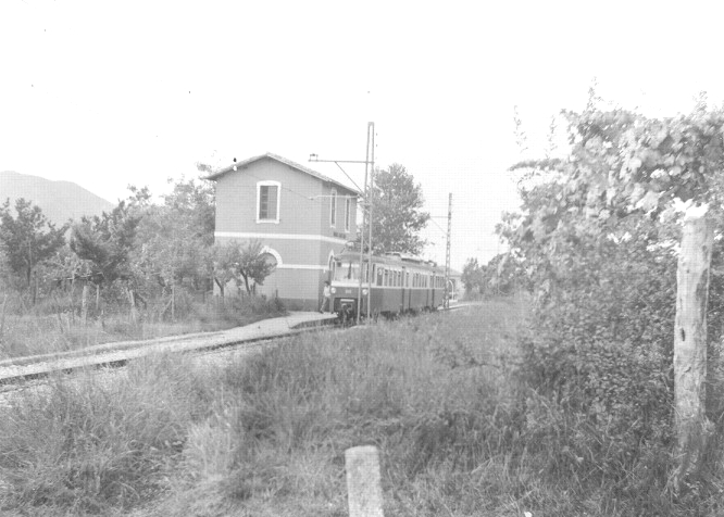 Foto di un treno